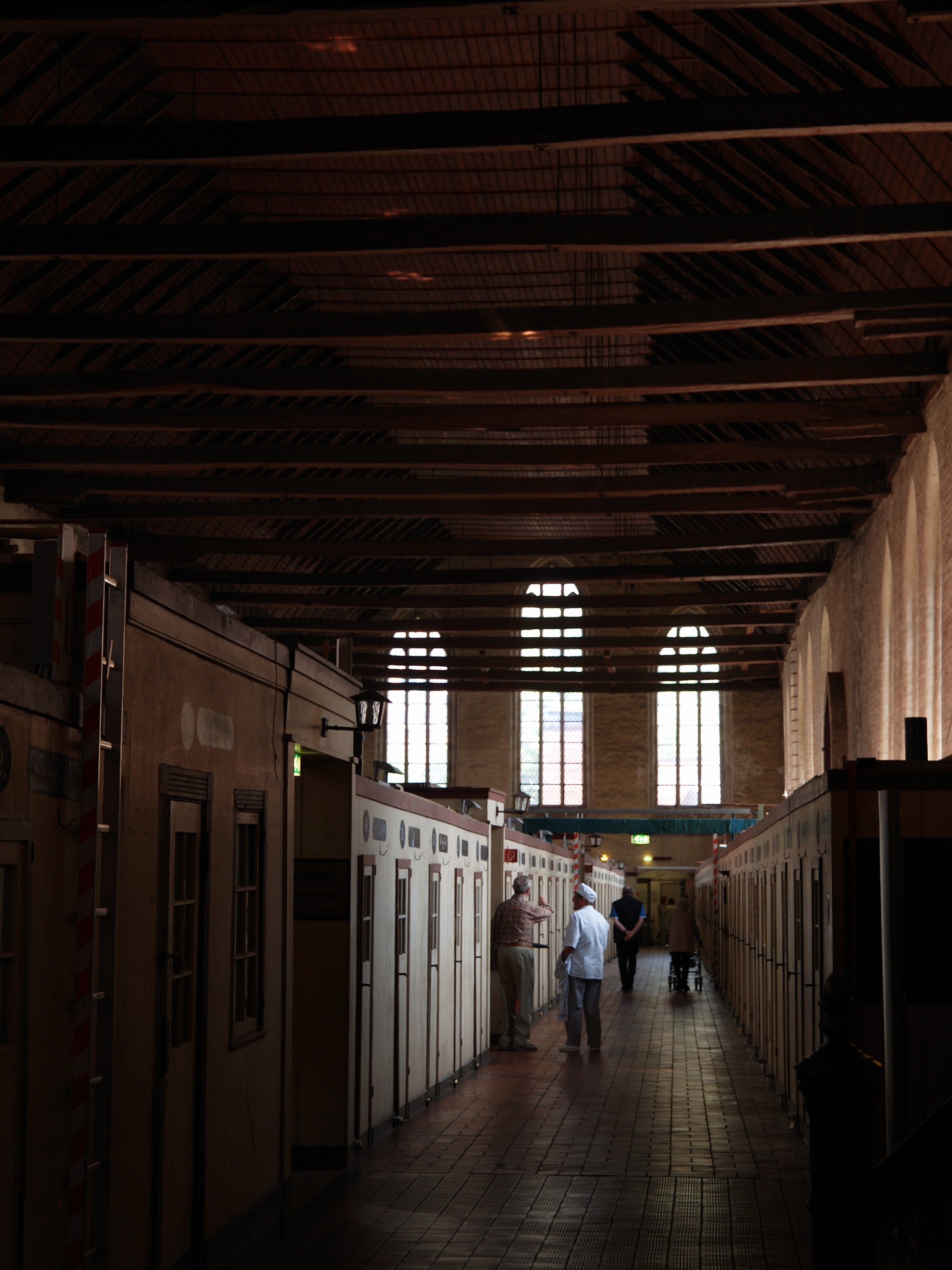 Gang im Hospitalbereich des Heiligen-Geist-Hospitals in Lübeck